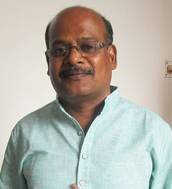 అన్నవరం దేవేందర్‌